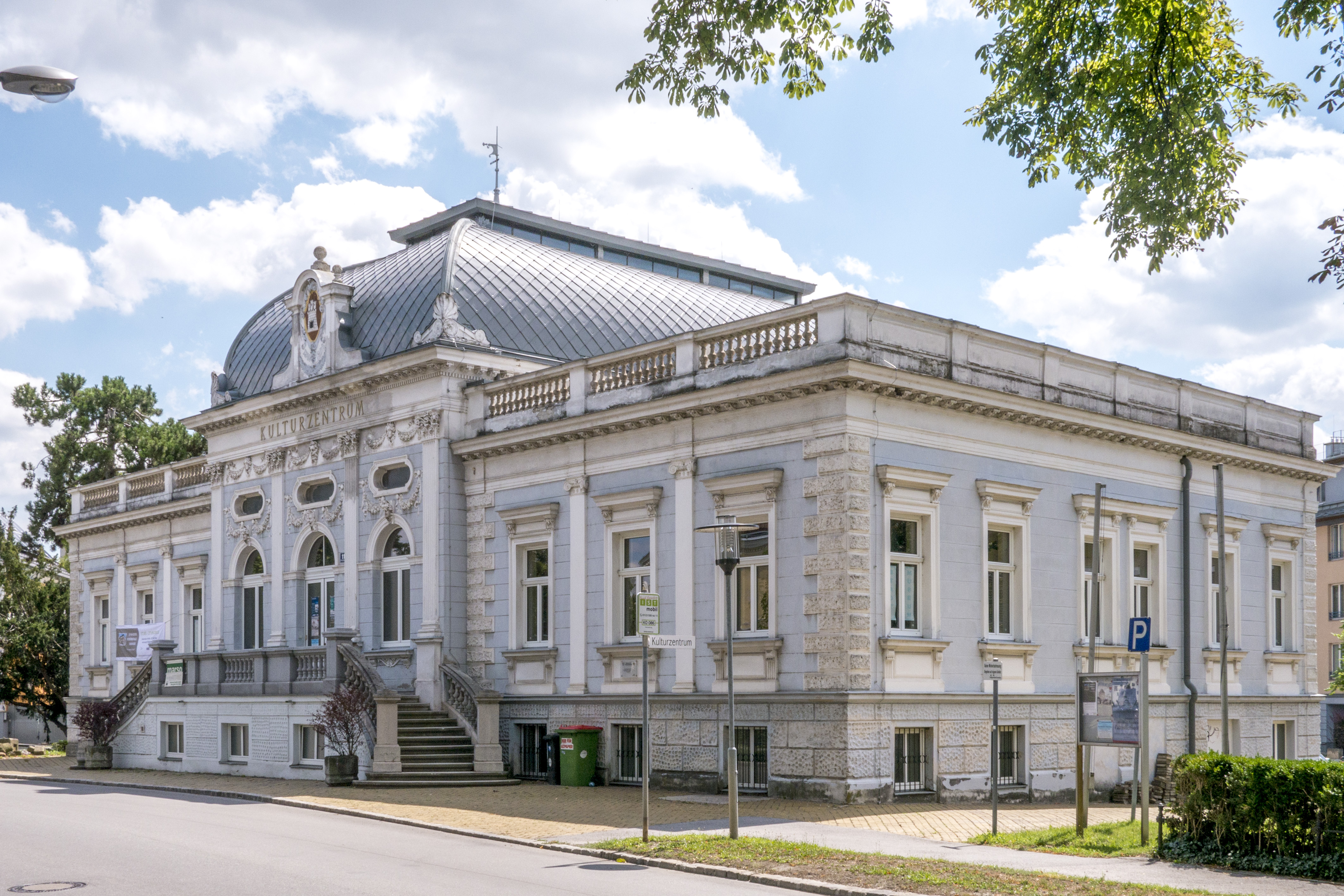 Museum/Ausstellungsbau, Badeanlage